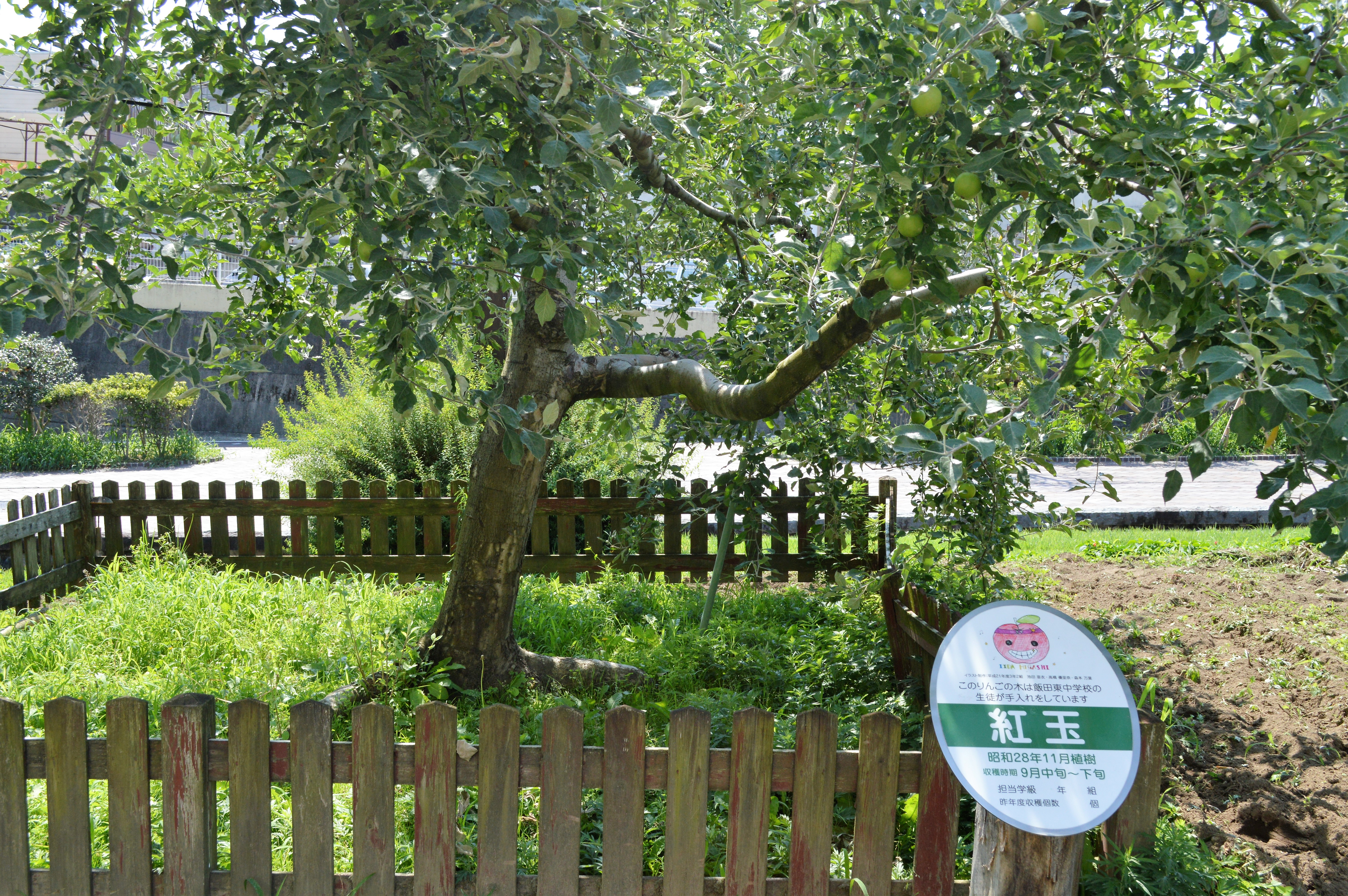 飯田市のりんご並木。